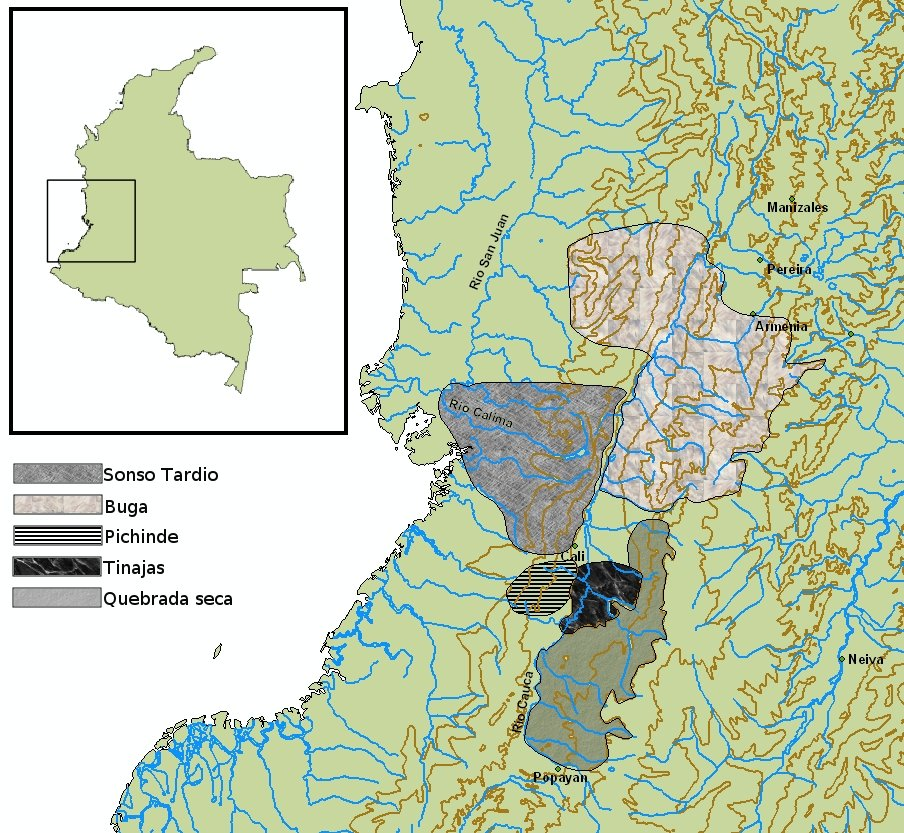 Periodo Tardio II, Valle del Cauca, Colombia